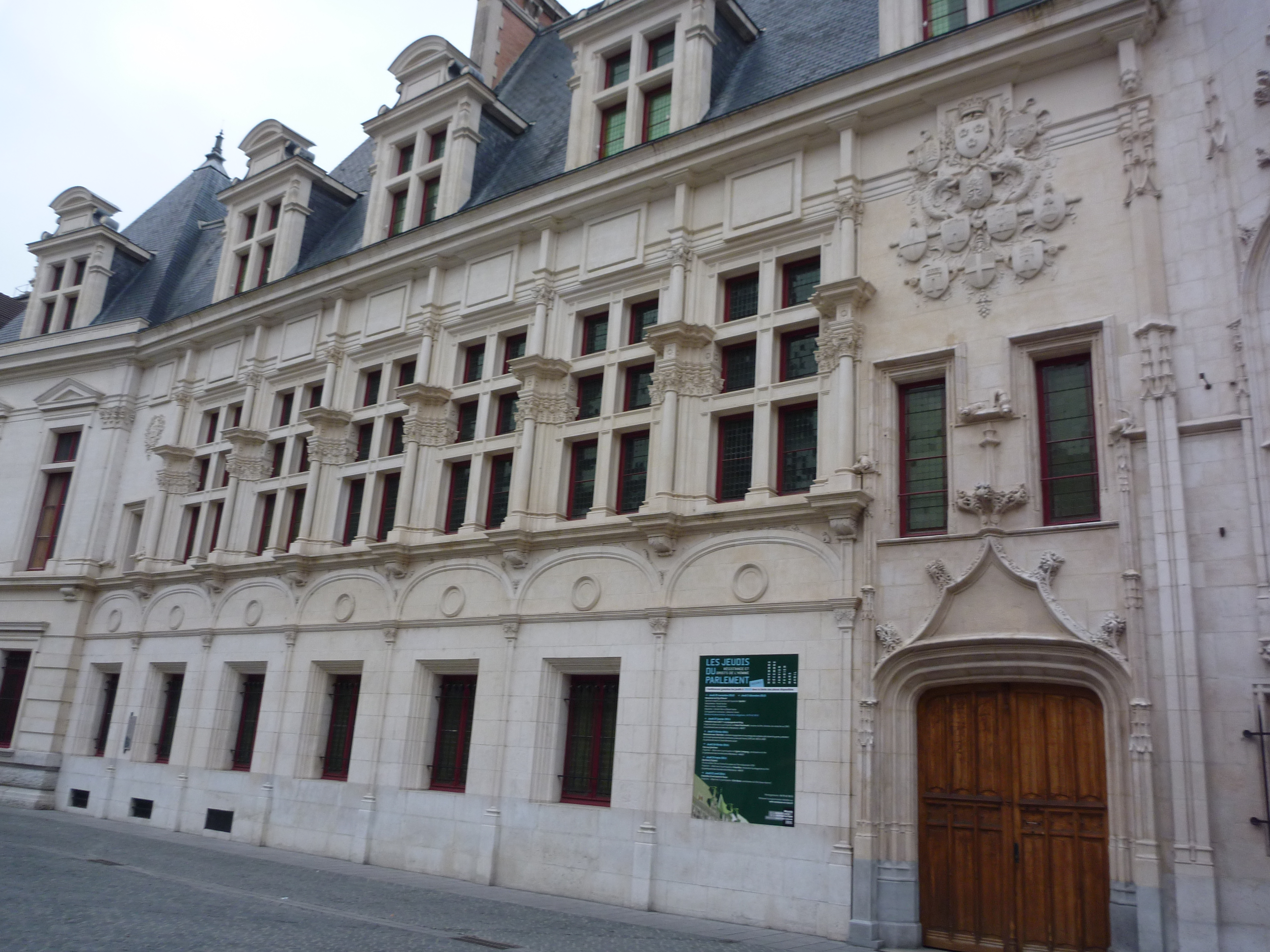 Ouvrage remarquable situé sur la place du Tribunal, on peut remarquer une partie ancienne et une partie "nouvelle" où les fenêtres du premier étages ont été remis dans le même alignement que celle du rez de chaussée, ce qui n'est pas apparent dans la partie ancienne.